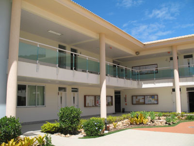 Prédio do Complexo de Ensino Superior de Santa Catarina (CESUSC)